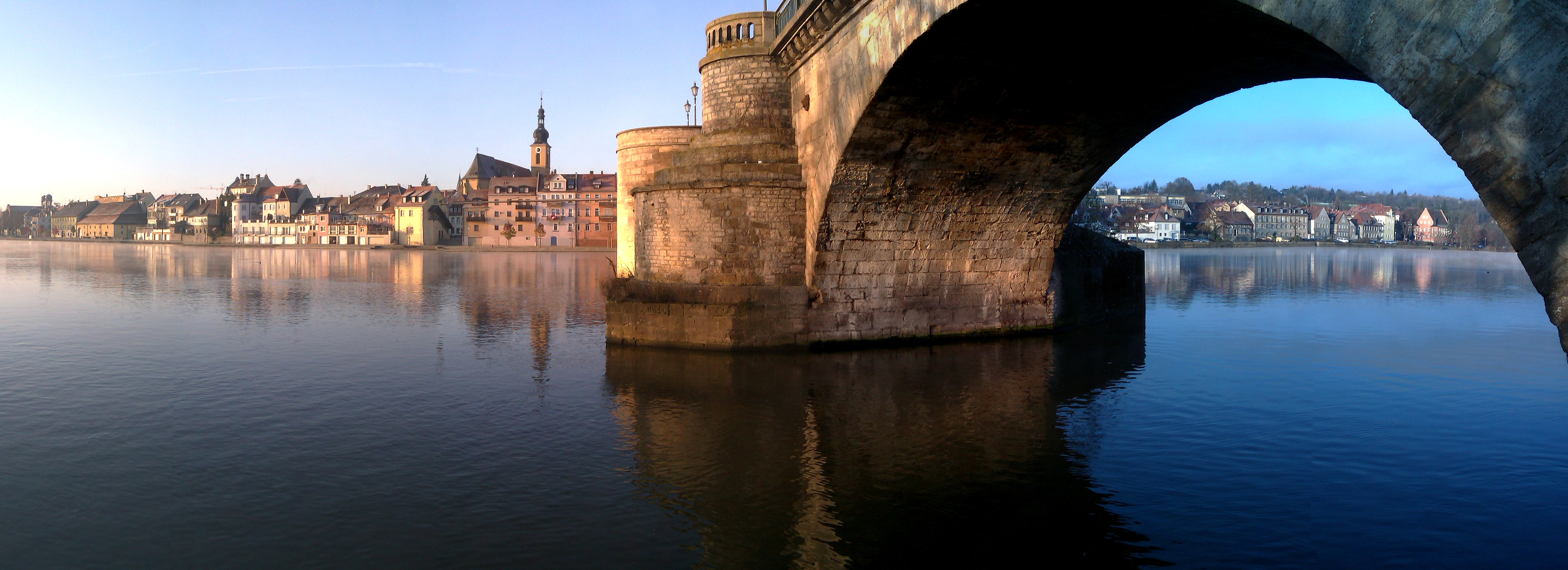 Kitzingen am Main mit Alter Mainbrücke